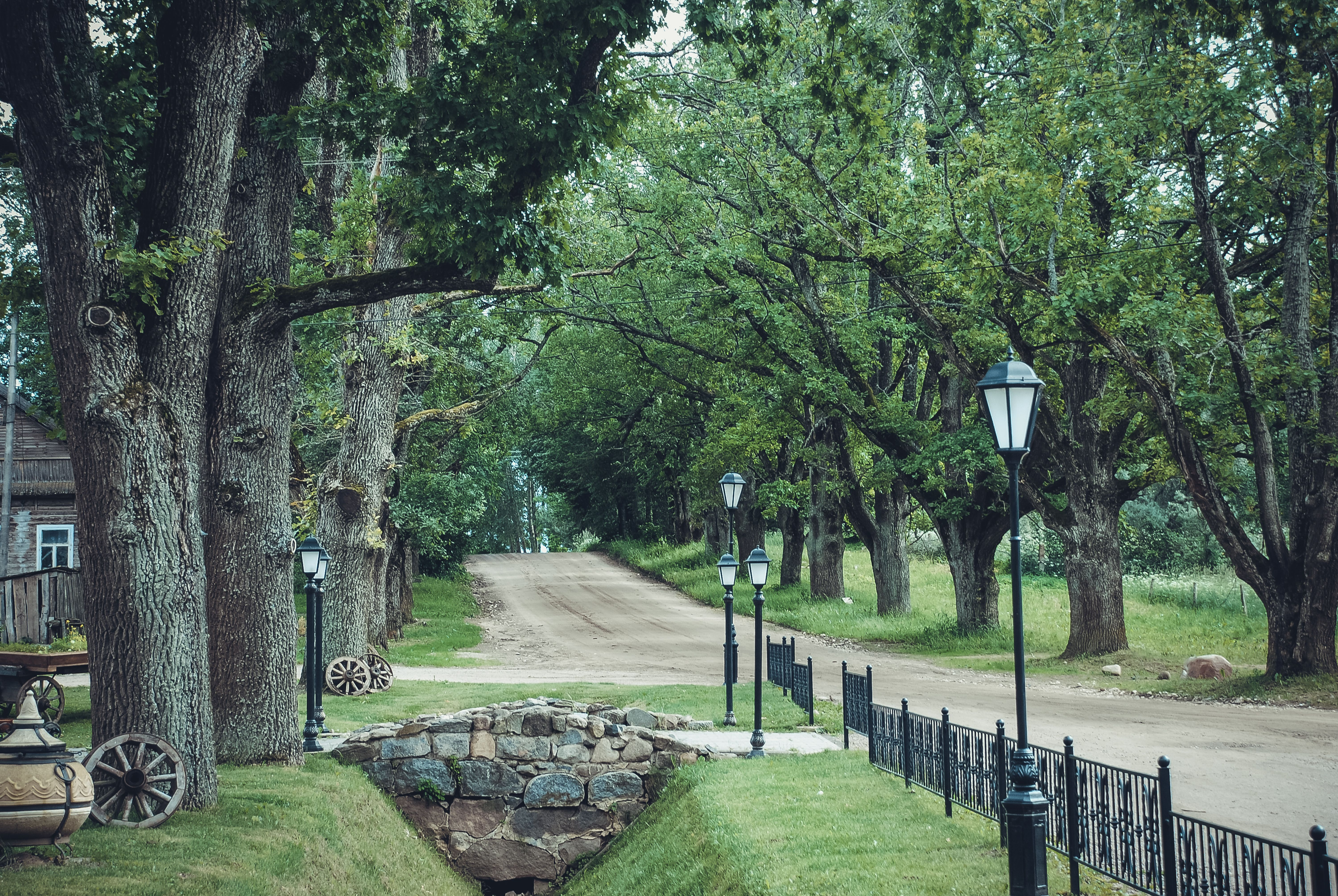 парк: Алтун, Новоржевский район, Псковская область